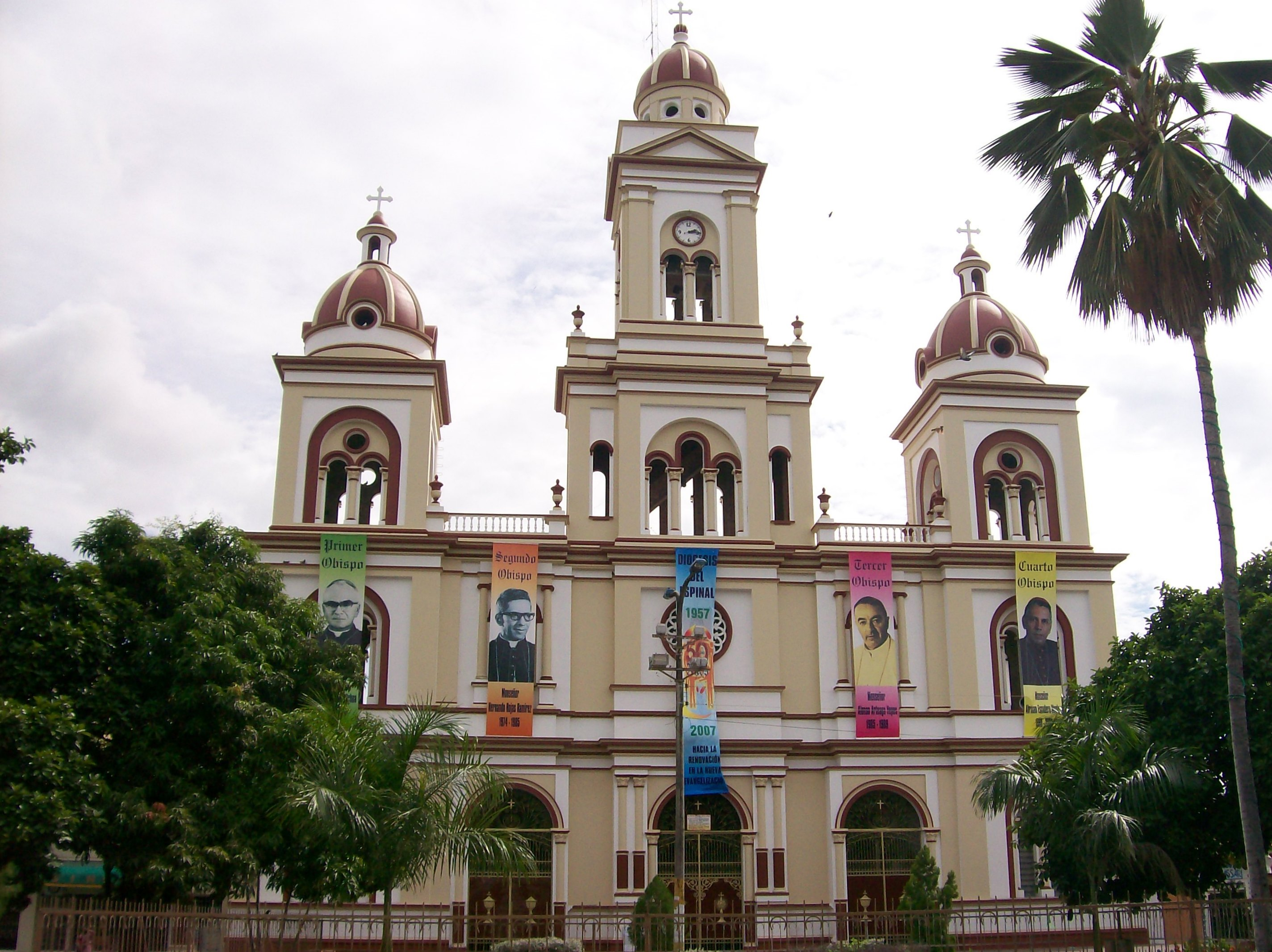 Catedral Nuestra Señora del Rosario del Espinal - Tolima